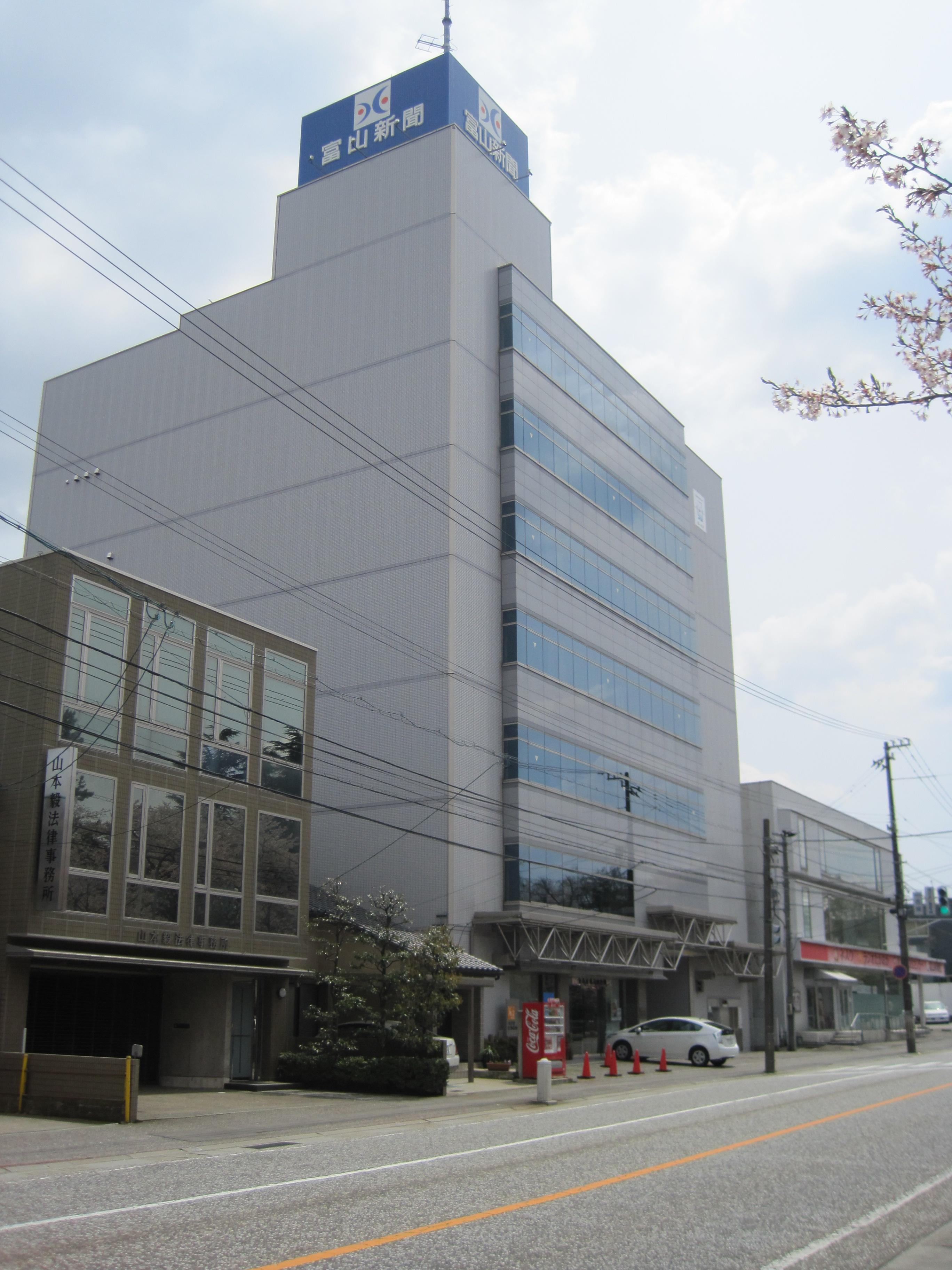 富山新聞社高岡支社（富山県高岡市）、コミュニティ放送局のラジオたかおかもこのビルに入居している。